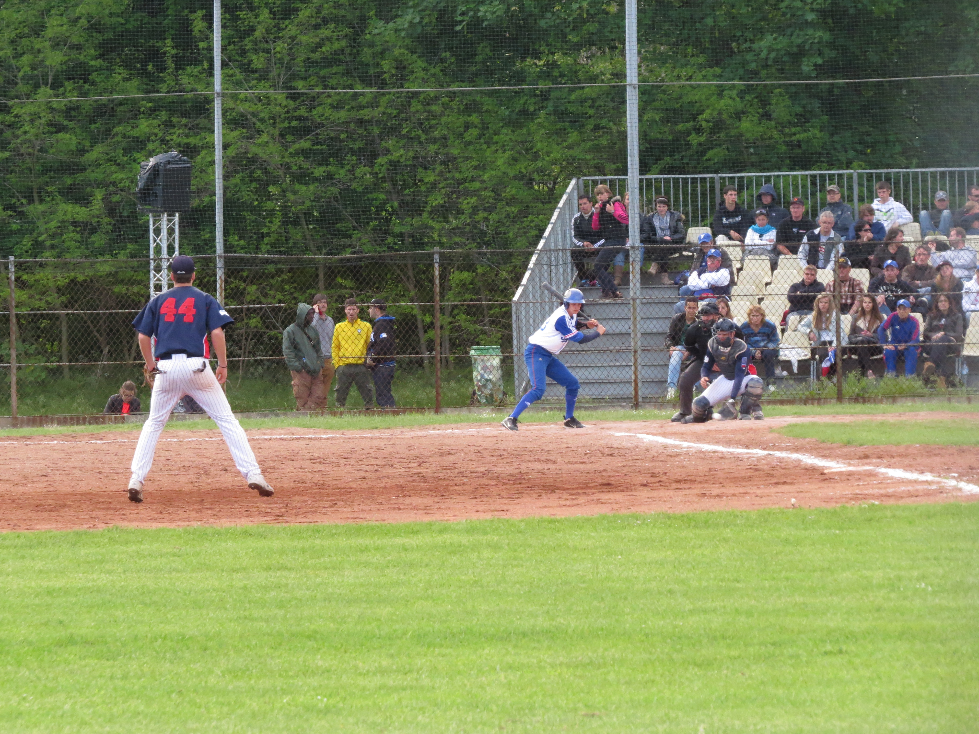 Demi-finale entre Rouen et Équipe de France 18U